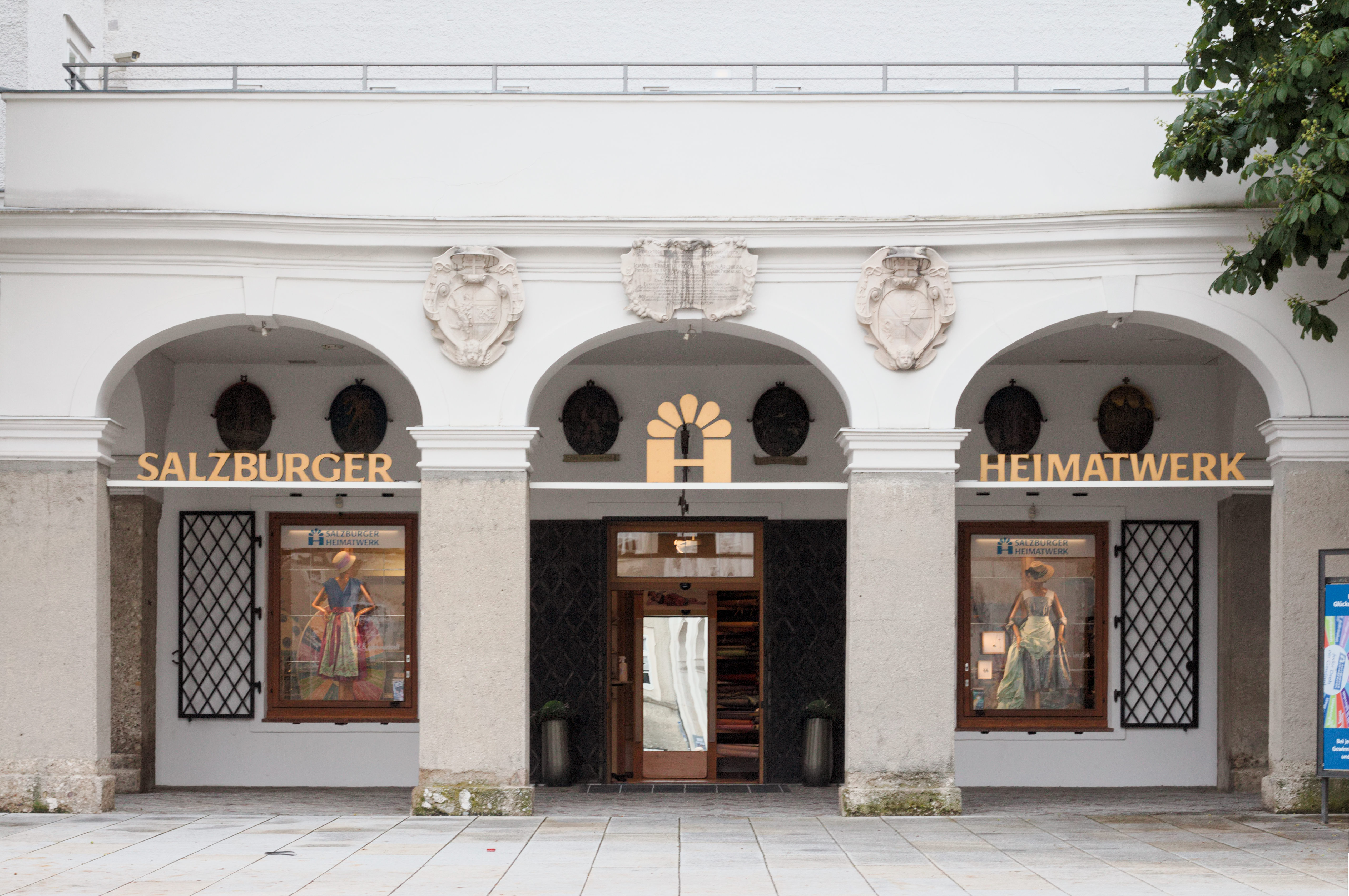 Salzburg, Altstadt: Ladenschild des Salzburger Heimatwerks in der Neuen Residenz (unter dem Glockenspiel)